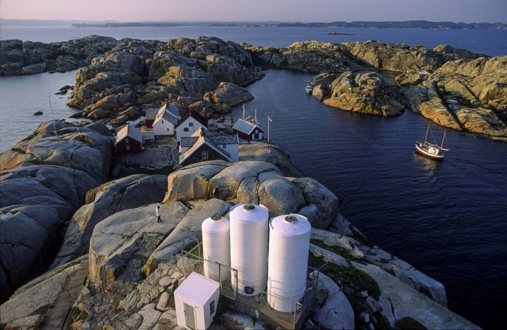 Utsikt fra Svenner Fyr.